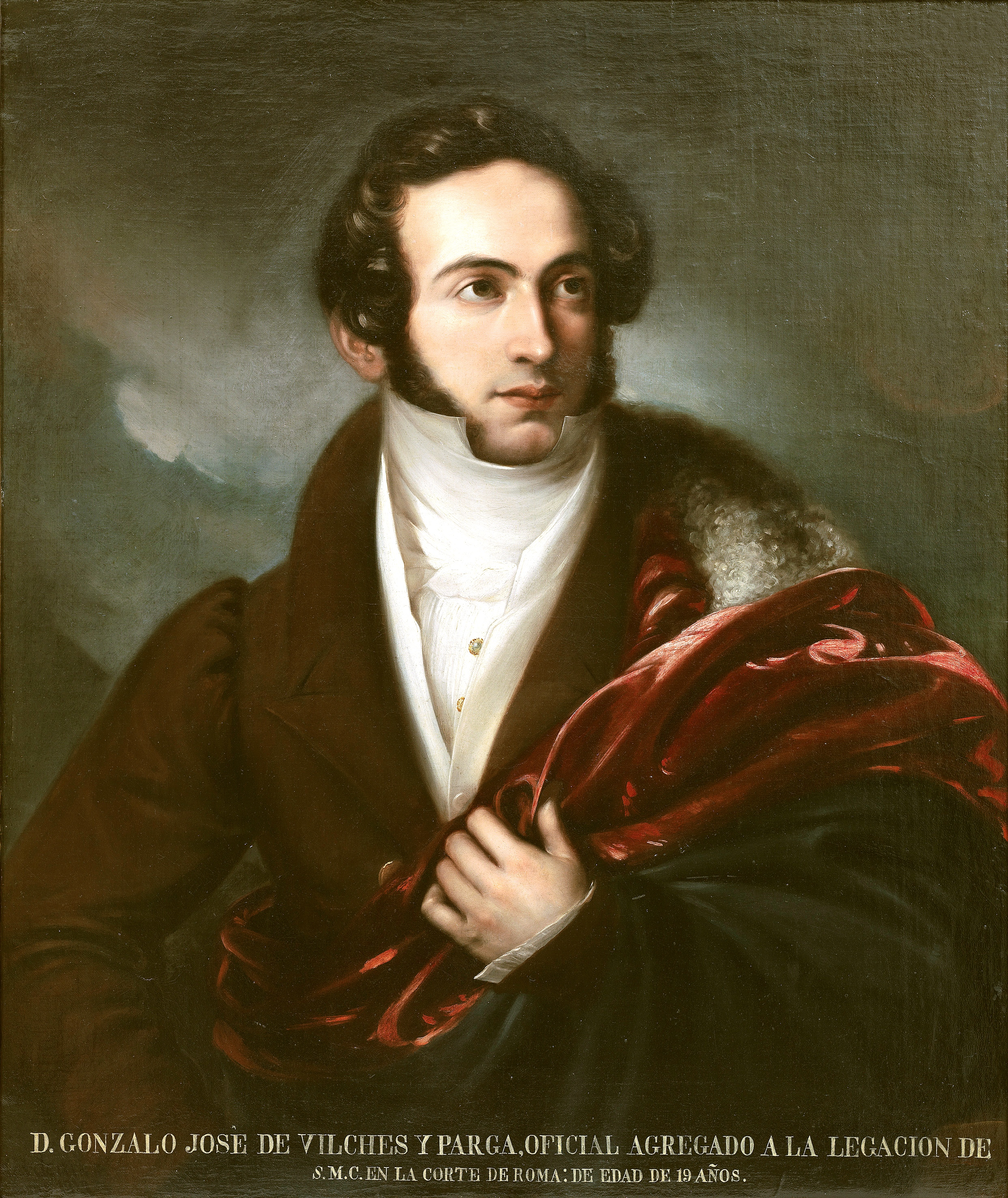 Retrato de Gonzalo José de Vilches y Parga (1808-1879), primer conde de Vilches y esposo de Amalia de Llano, cuyo célebre retrato fue pintado por Federico de Madrazo.